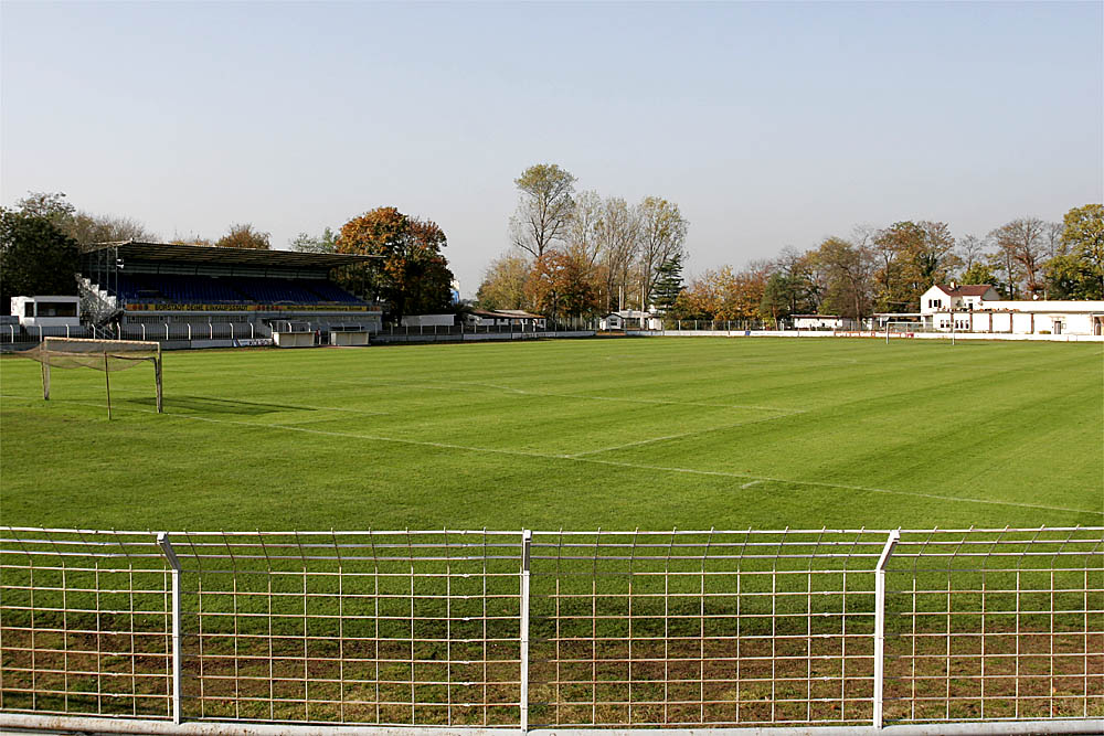 Rasenplatz und Tribüne des Robert-Kölsch-Stadion, Heimplatz des VfR Bürstadt, Hans-Dieter Niepötter, für bessere Auflösung Anfrage an )